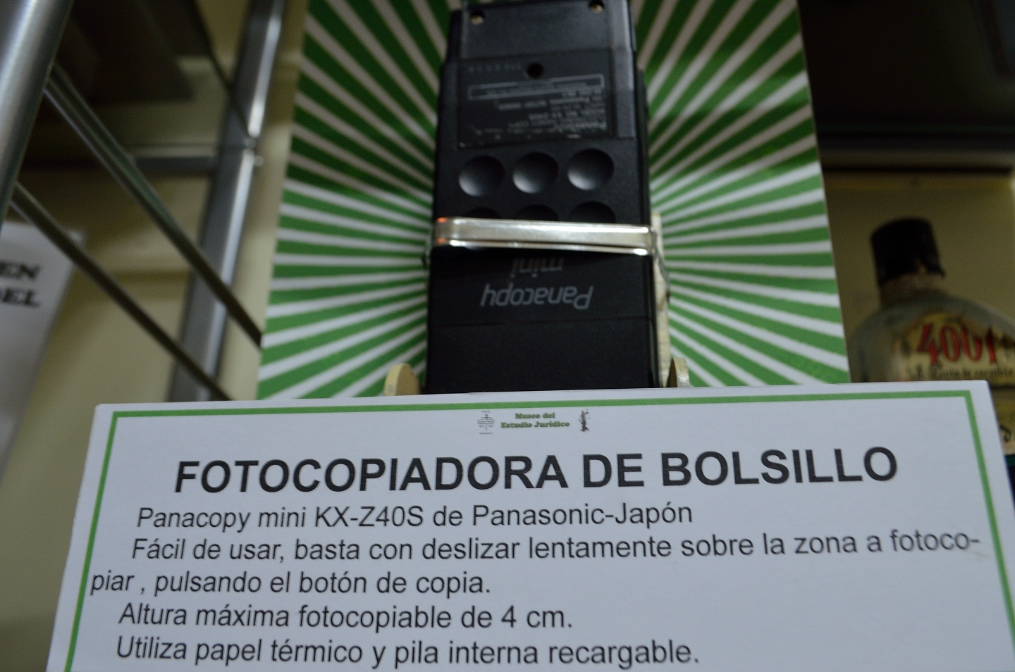 Esta fue una maquinita utilizada para fotocopiar los expedientes. Realmente se podía guardar en un bolsillo, pero no tuvo gran difusión debido a su escasa capacidad de fotocopiar hojas grandes.